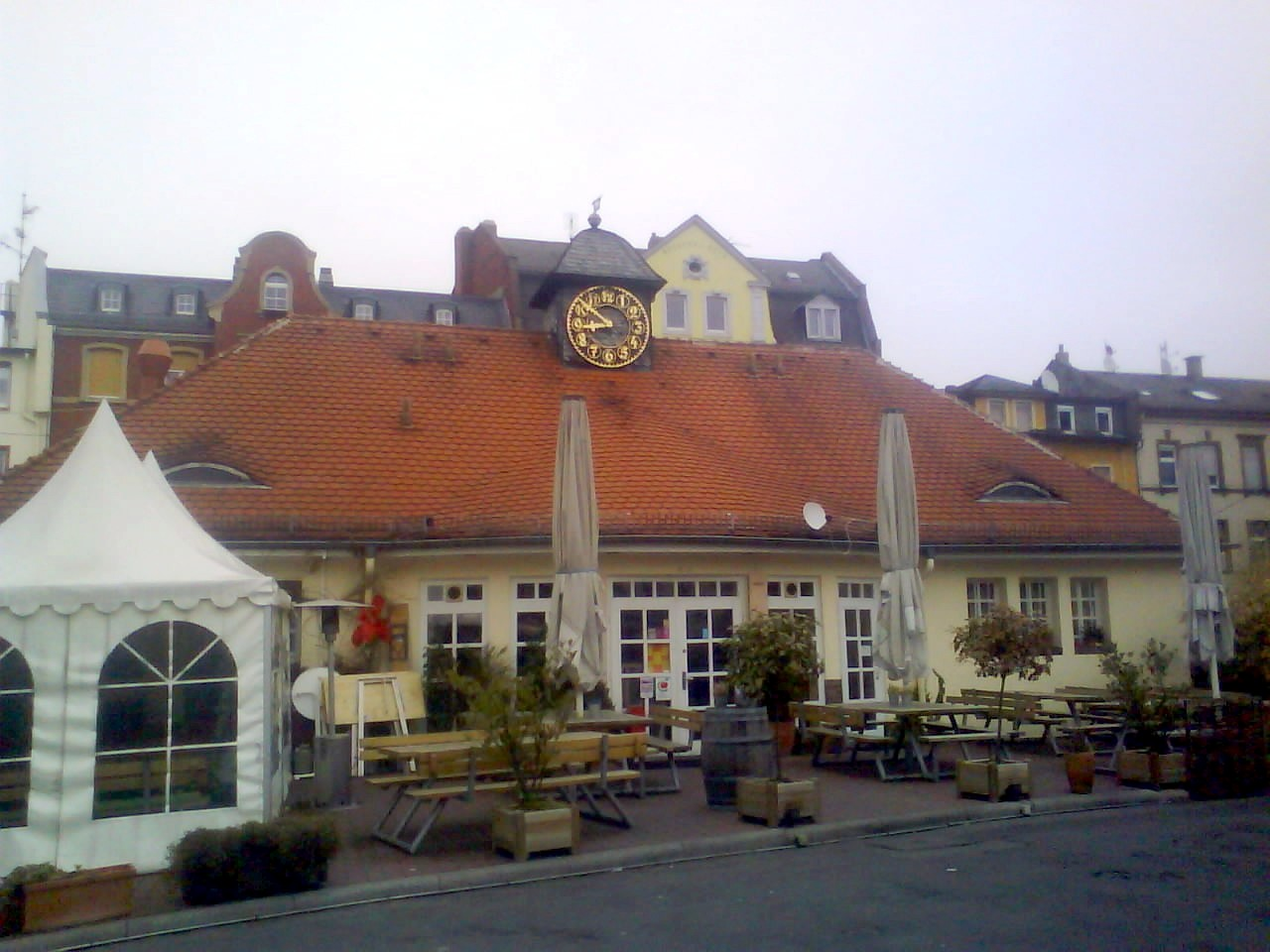 Das Markthäuschen, beliebter Treffpunkt am Wilhelmsplatz in Offenbach am Main, Bieberer Straße 9B